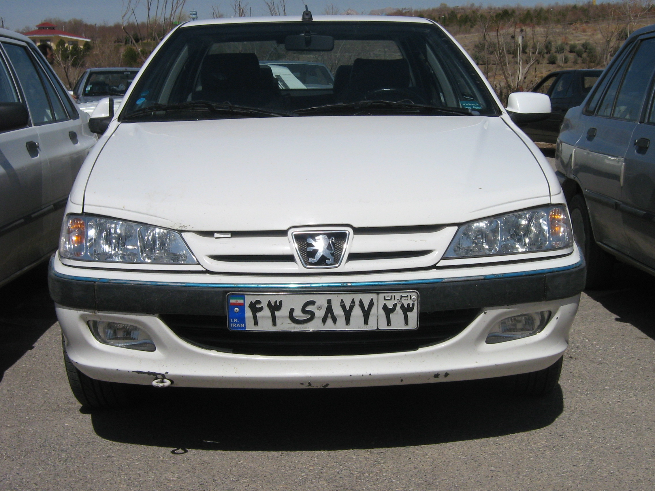 نمای جلویی پژو پارس ئی‌ال‌اکس Template:انگلیسی